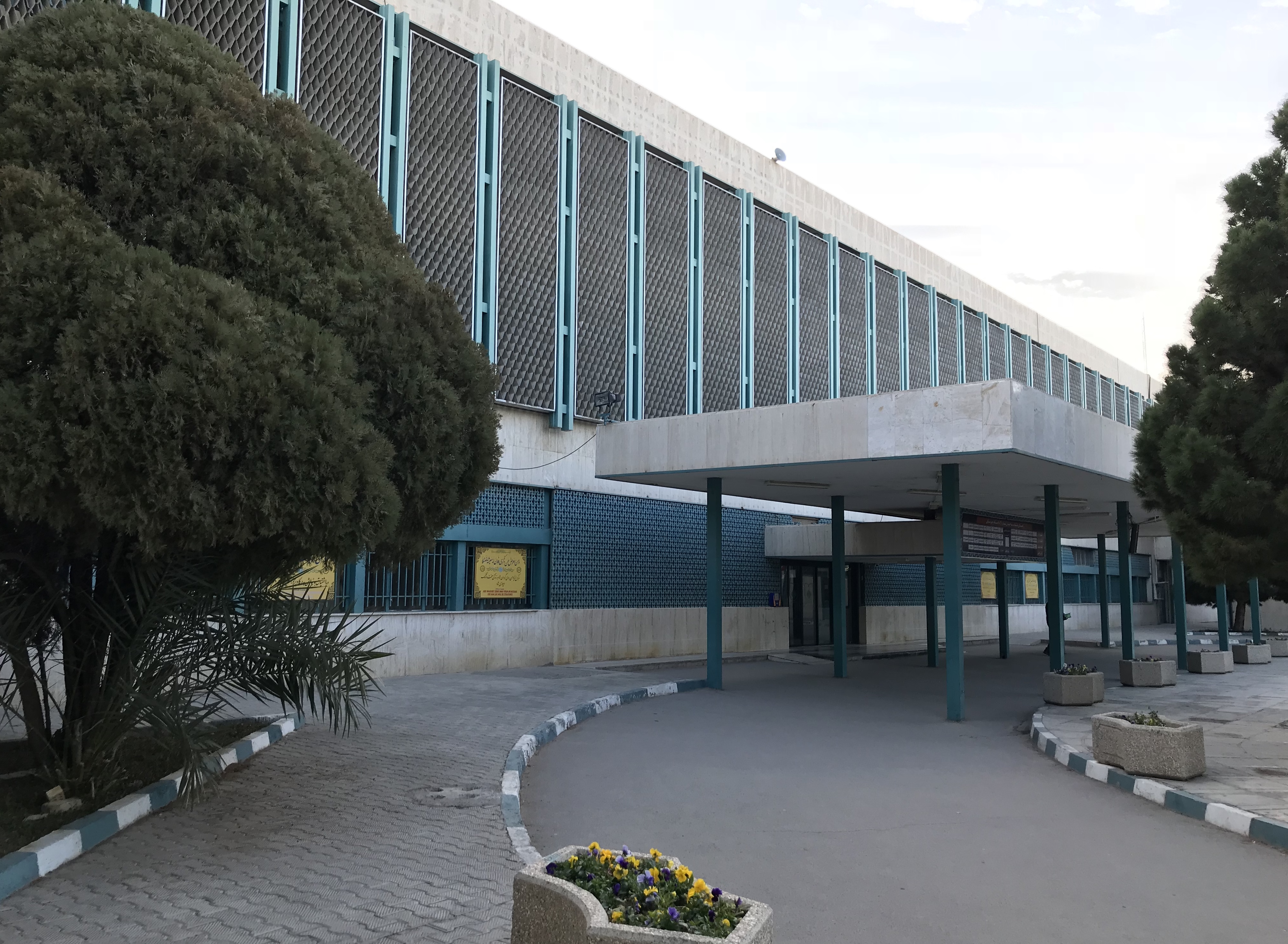 ورودی دانشکده پزشکی اصفهان